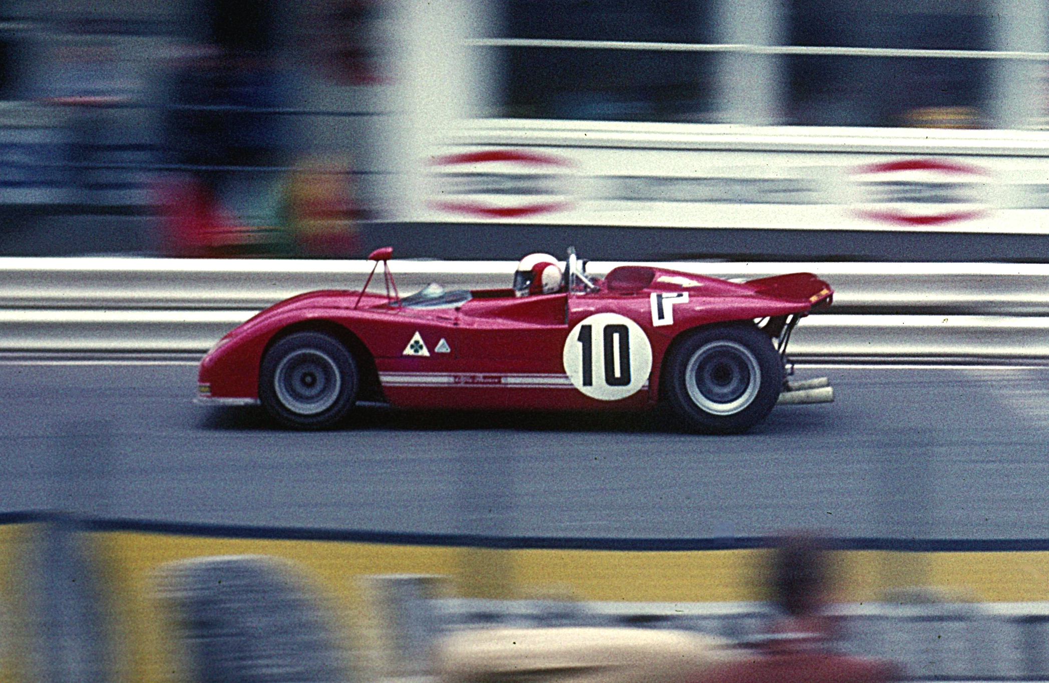 Rolf Stommelen im Alfa Romeo 33.3 beim Training zum 1000-km-Rennen auf dem Nürburgring 1971; Start-und-Ziel-Gerade